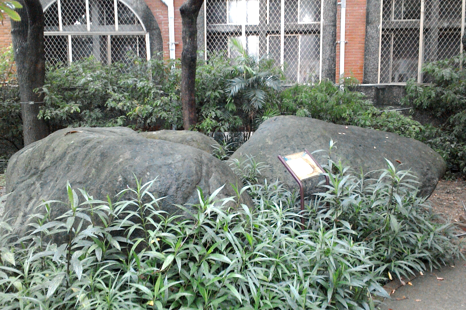 公館凝灰岩,台北市大安區學府次分區學府里